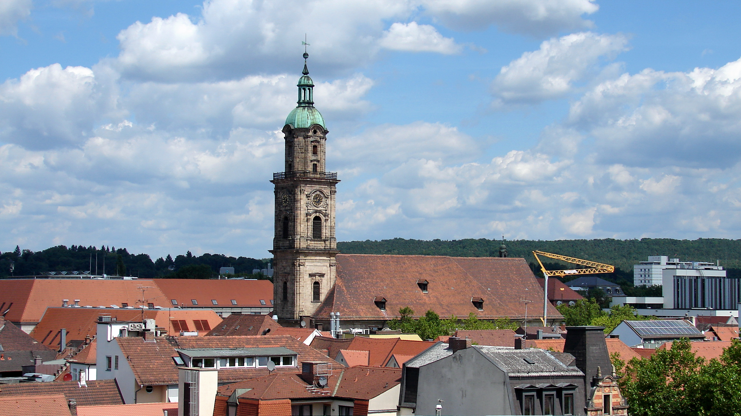 Die Neustädter Kirche ist das Kirchengebäude der evangelisch-lutherischen Gemeinde in der 1686 gegründeten Neustadt Erlangen sowie Universitätskirche der Friedrich-Alexander-Universität Erlangen-Nürnberg.